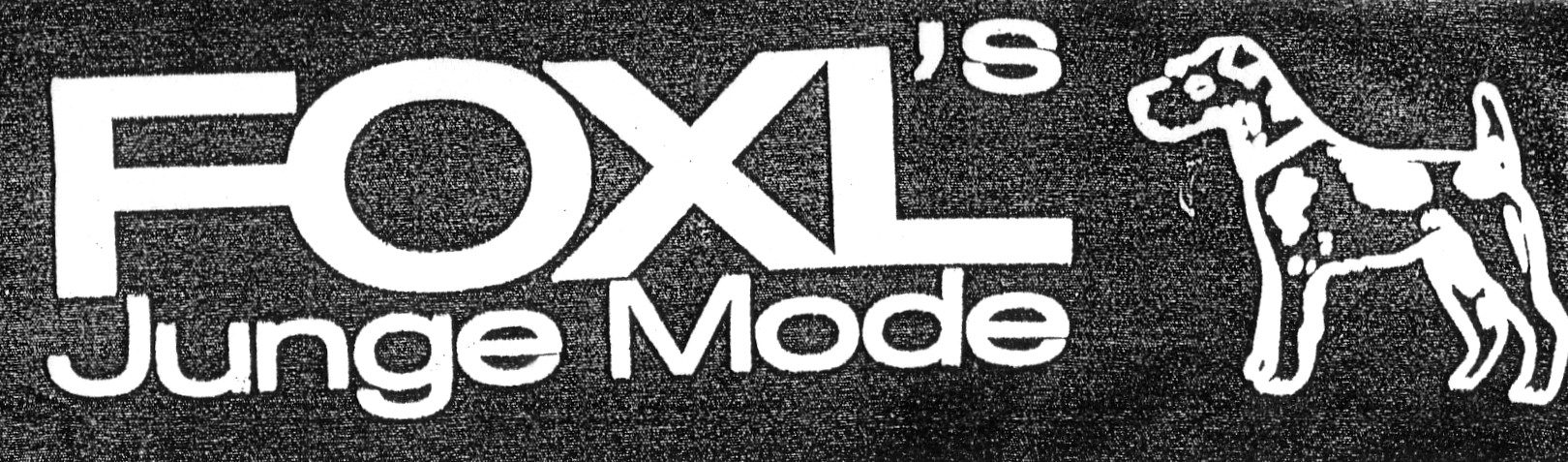 Um seine Baby- und Kindermoden-Kollektion zu erweitern, kaufte im Jahr 1996 die Geschäftsleitung von J. Hakenmüller-Hasana die Kollektion und komplette Marketing-Rechte der in Auflösung gegangenen Textilfabrik ´Foxl-Young-Fashion`, Winterlingen auf der Schwäbischen Alb, in der Nähe von Albstadt-Ebingen. In 1996 J. Hakenmüller-Hasana bought the collection and the complete marketing-rights of the dissolved textile-manufacturer Foxl-Young-Fashion in Winterlingen on the Suebian Alb, near Albstadt-Ebingen in South-Western-Germany.